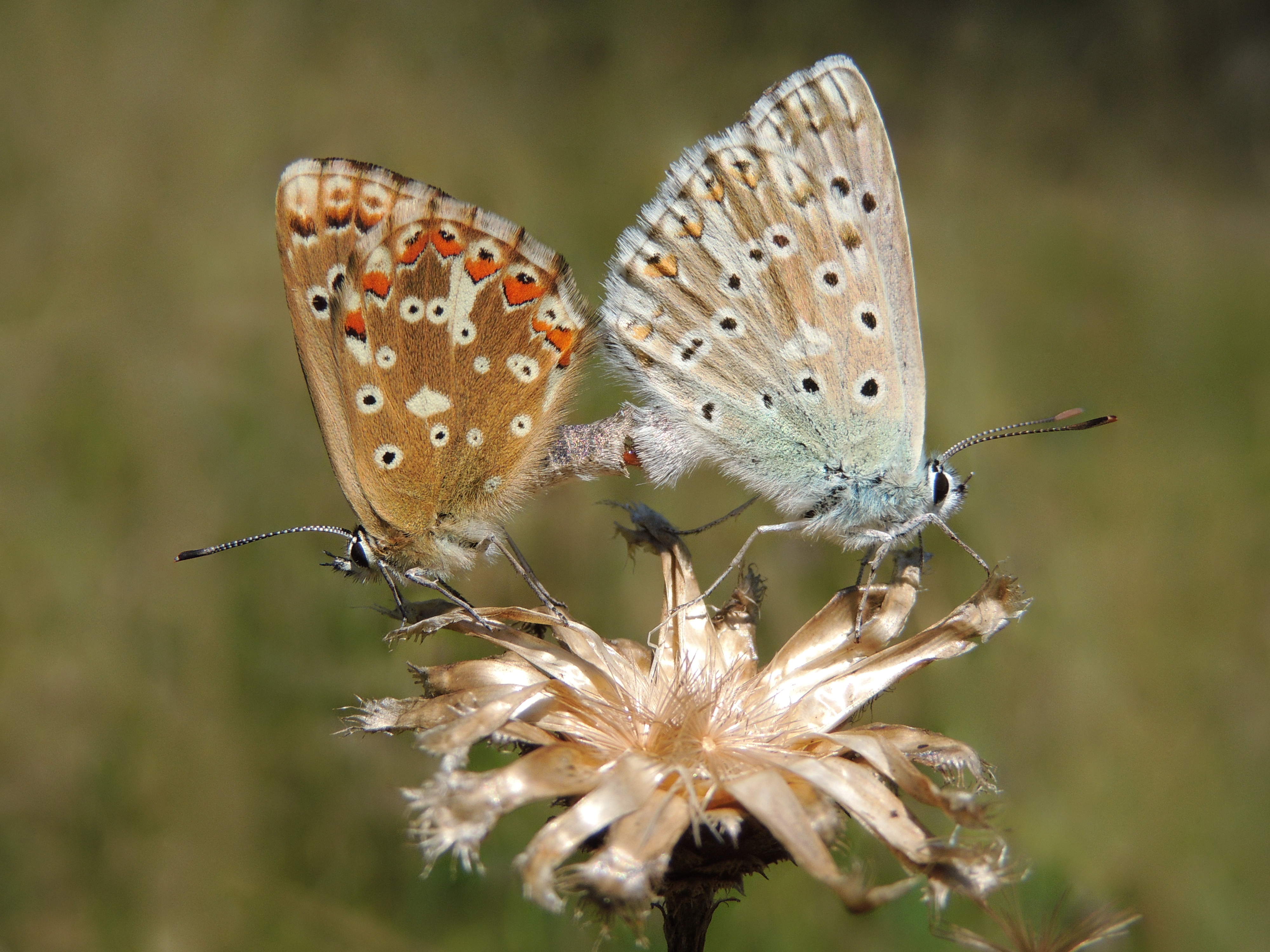 Chalkhill blue Silbergrüner Bläuling